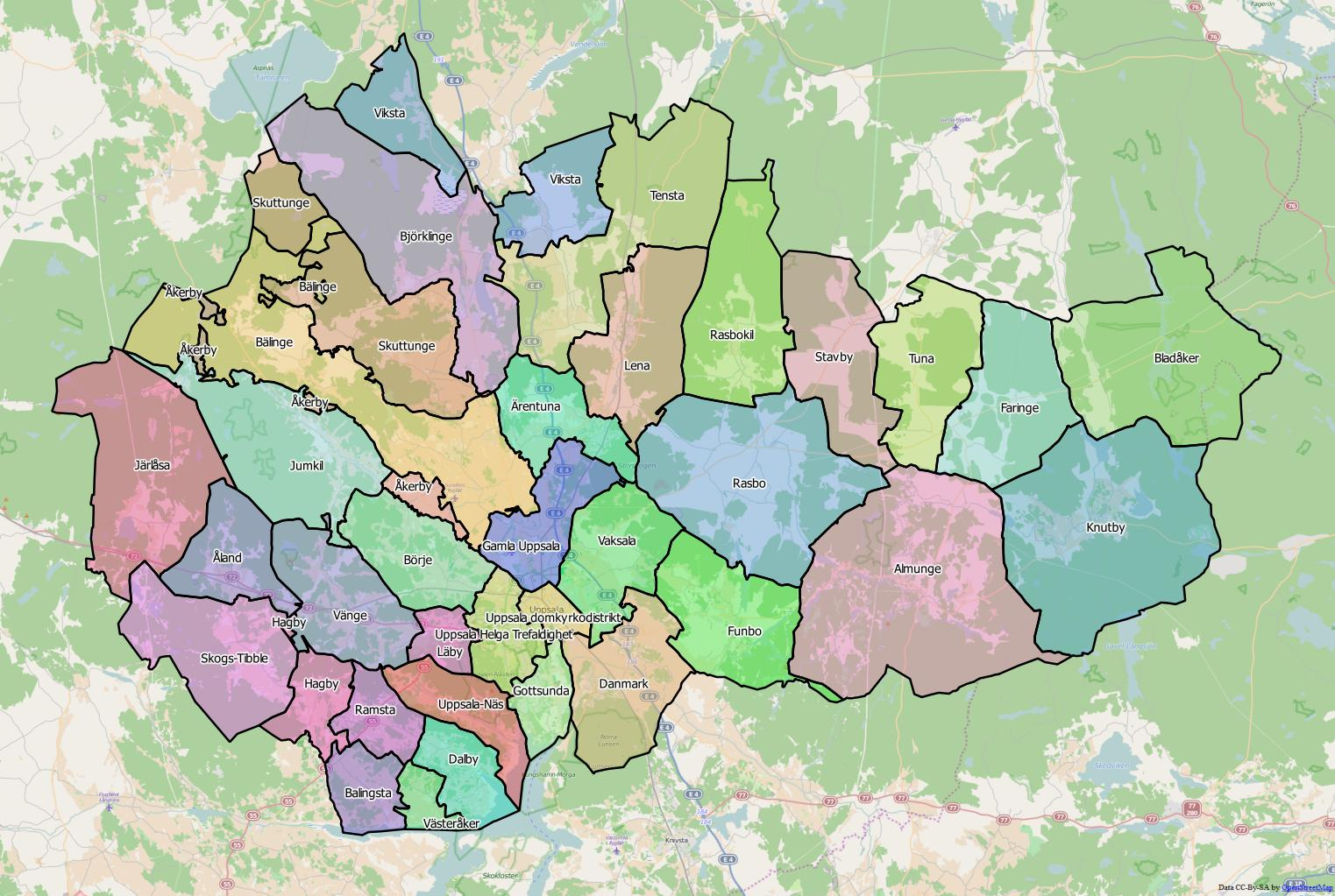 Distriktsindelningen i Uppsala kommun World file: 110.63334388325203861 0 0 -110.63334388325203861 1894811.36617641616612673 8445448.5036515686661005